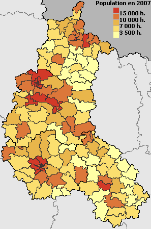 Carte des cantons de Champagne-Ardenne par nombre d'habitants en 2007 (populations municipales).